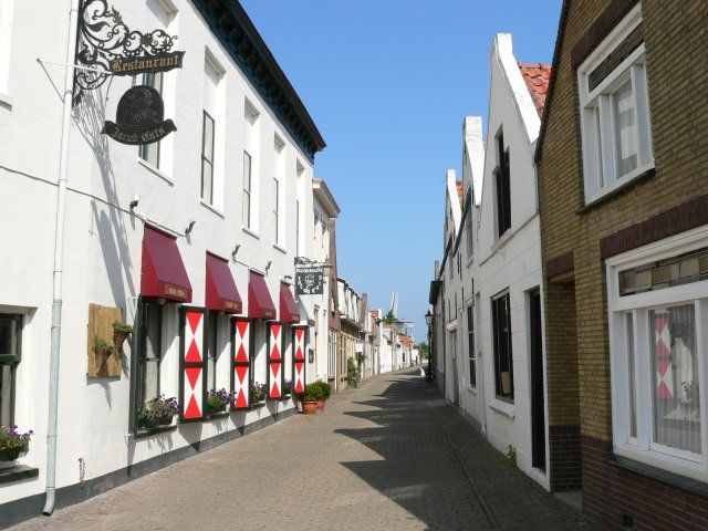 Gasse in Brouwershaven Sonstiges: eigenes Foto ohne Personendarstellung zur freien Nutzung